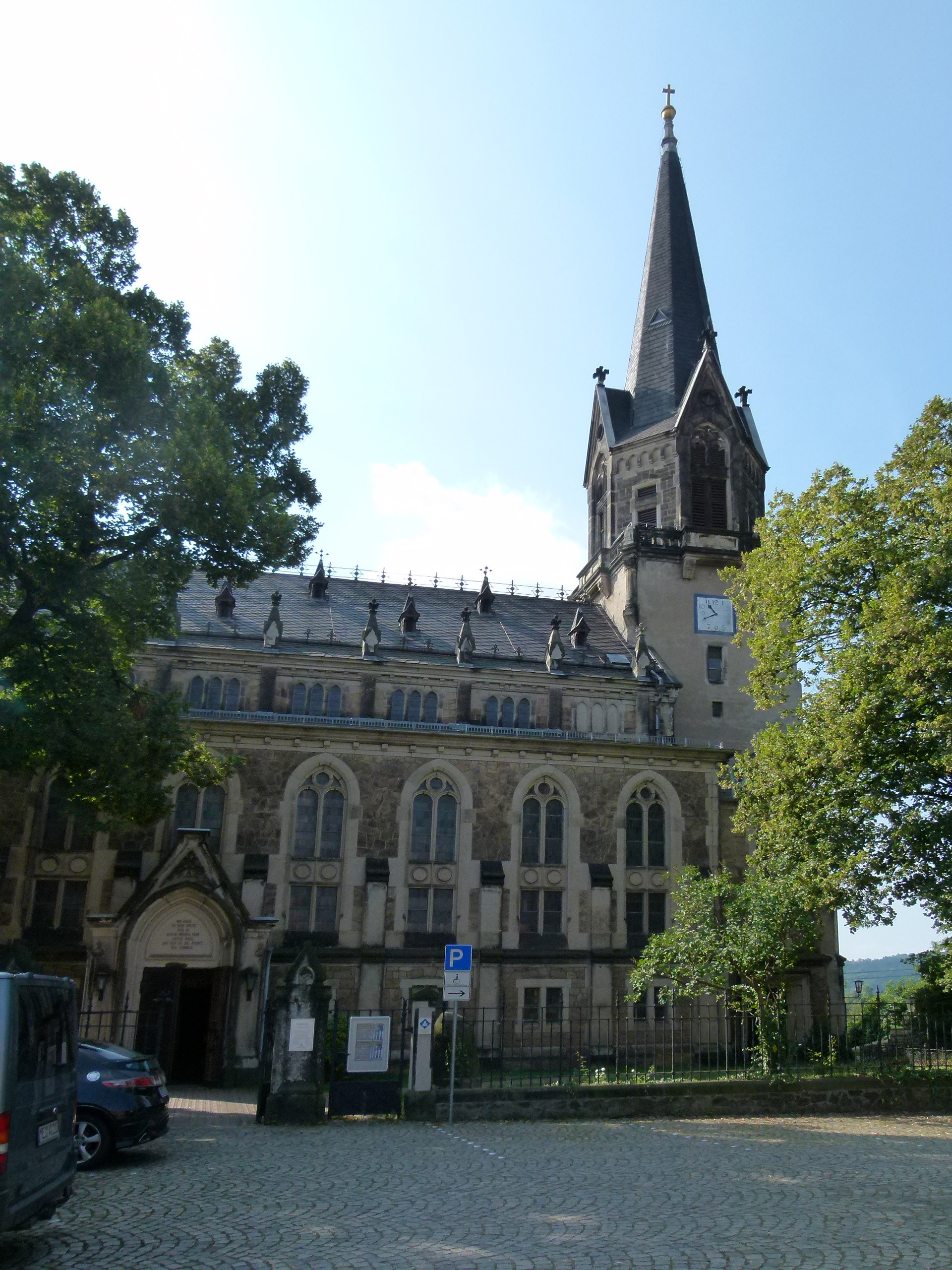 Friedenskirche Kötzschenbroda, Altkötzschenbroda, Radebeul, Sachsen